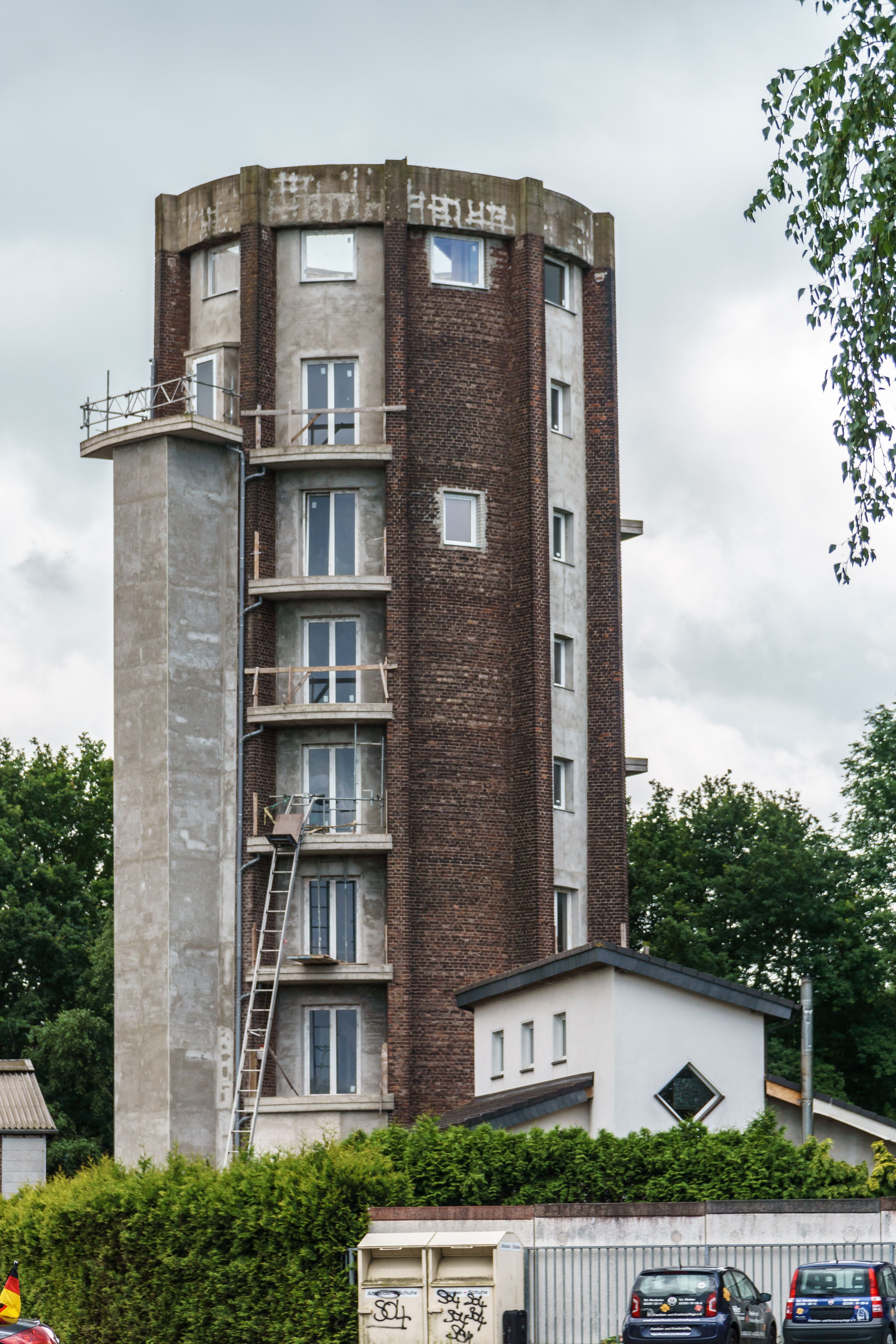 Wasserturm, umgebaut zum Wohngebäude, Schöntaler Straße 48 in Wetter (Ruhr)